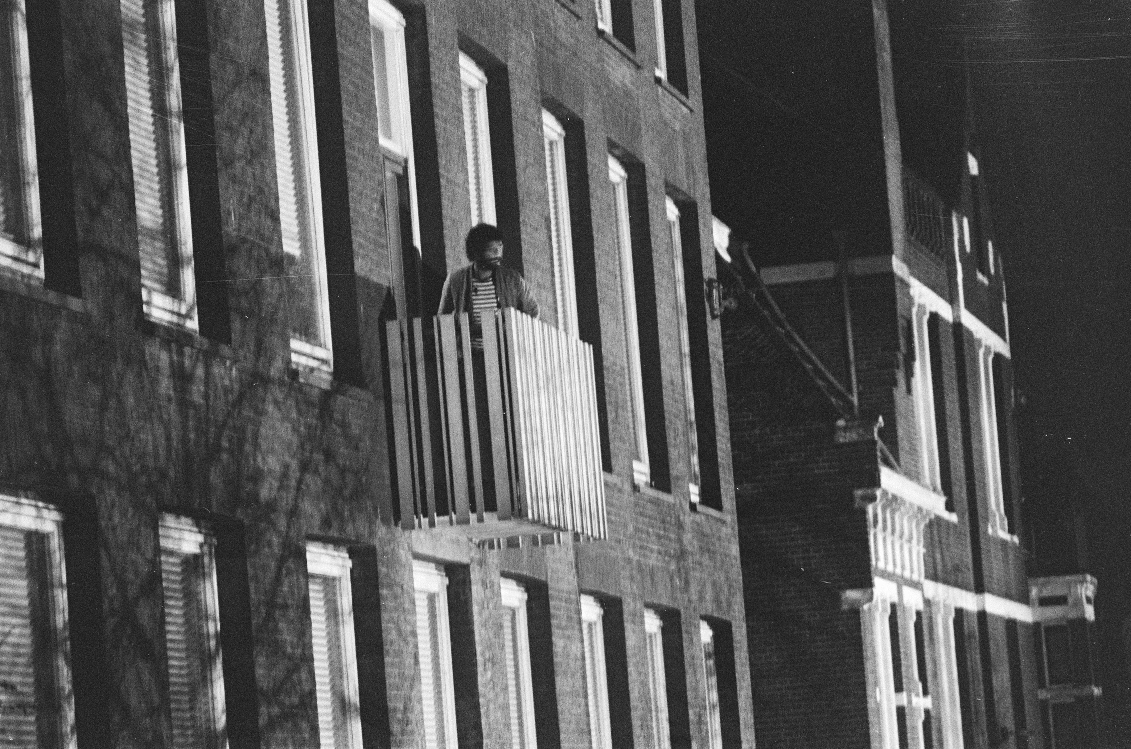 Collectie / Archief : Fotocollectie Anefo Reportage / Serie : [ onbekend ] Beschrijving : Gijzeling in Indonesisch Consulaat Amsterdam; Zuidmolukker ongewapend op balkon Datum : 18 december 1975 Locatie : Amsterdam, Noord-Holland Trefwoorden : balkons, consulaten, gijzelingen Instellingsnaam : Indonesisch Consulaat Fotograaf : Verhoeff, Bert / Anefo Auteursrechthebbende : Nationaal Archief Materiaalsoort : Negatief (zwart/wit) Nummer archiefinventaris : bekijk toegang 2.24.01.05 Bestanddeelnummer : 928-3308